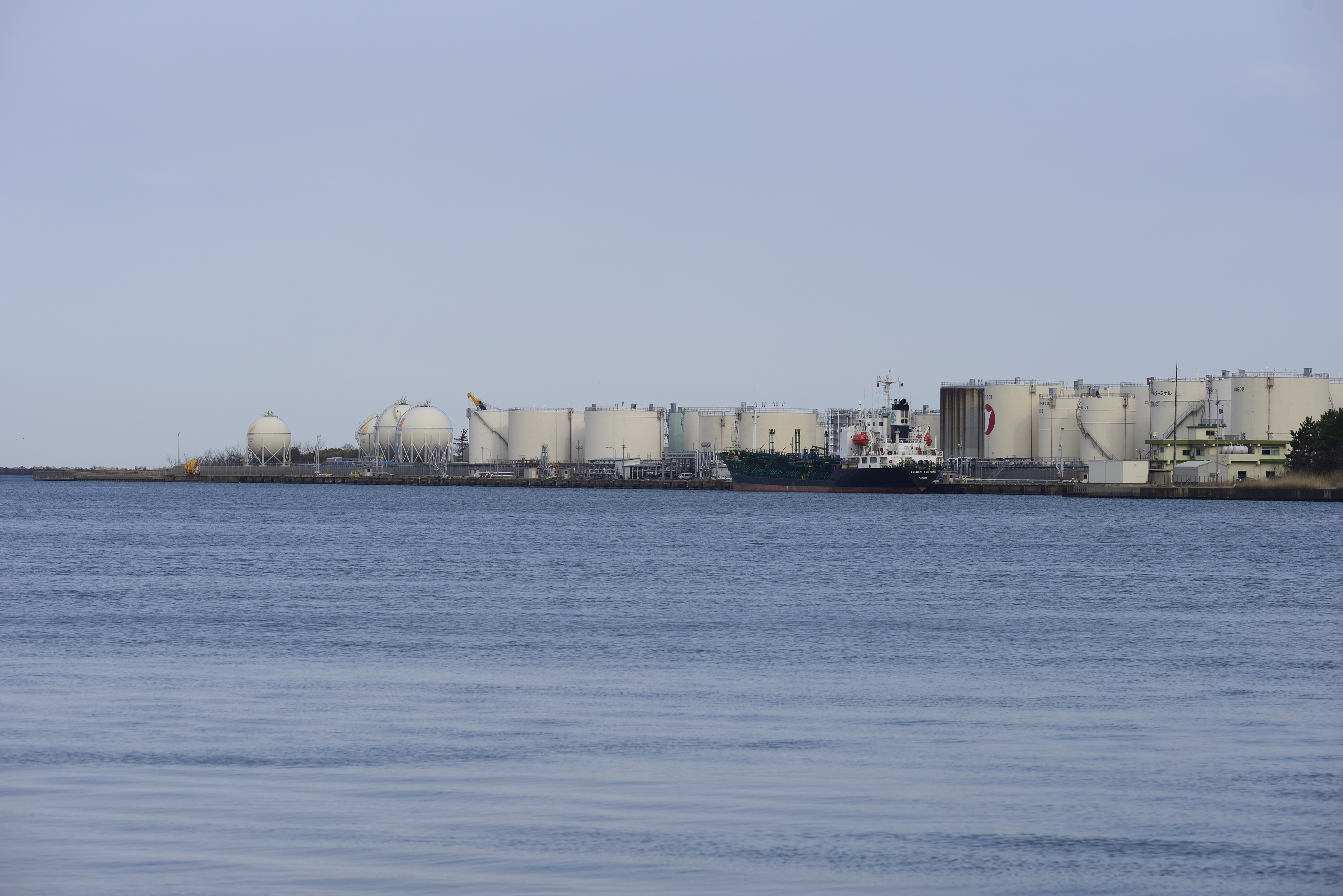 金沢港